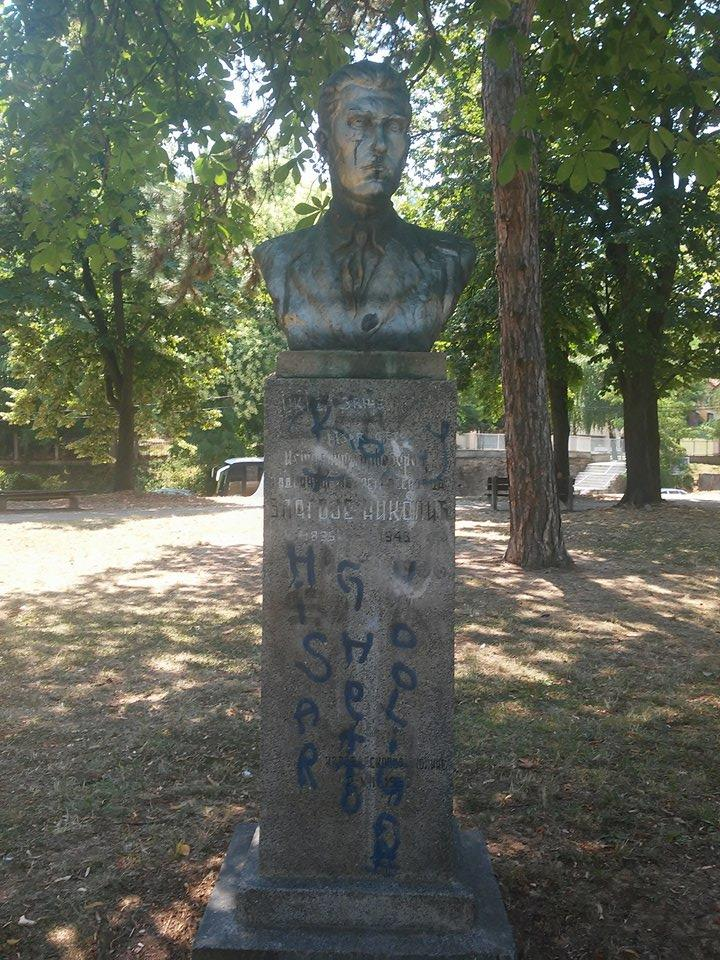 Биста Благоја Николића